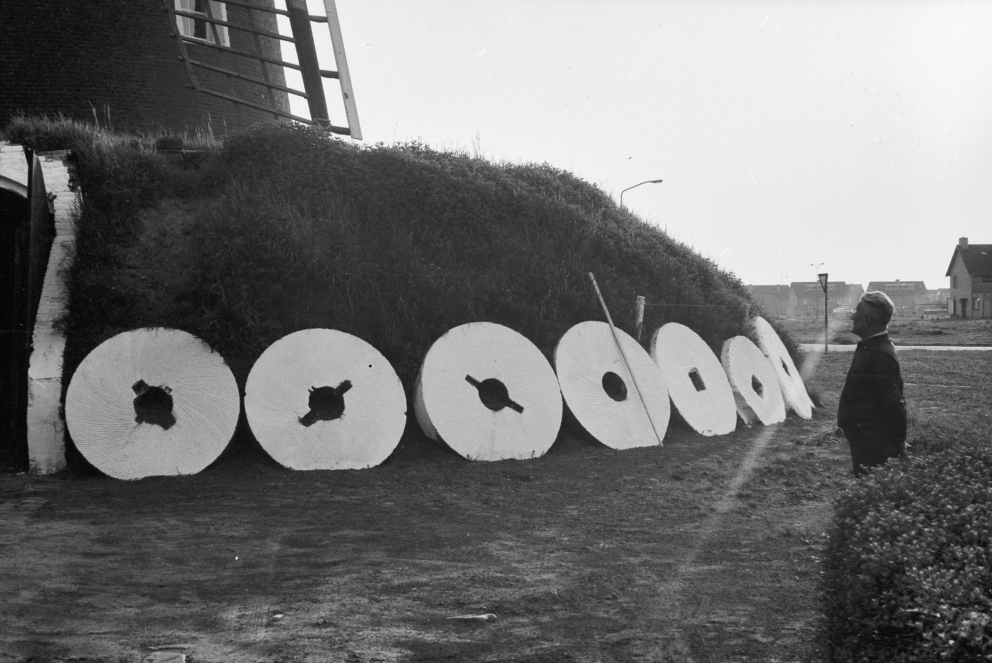 Diversen: korenmolen "De Doornenboom"